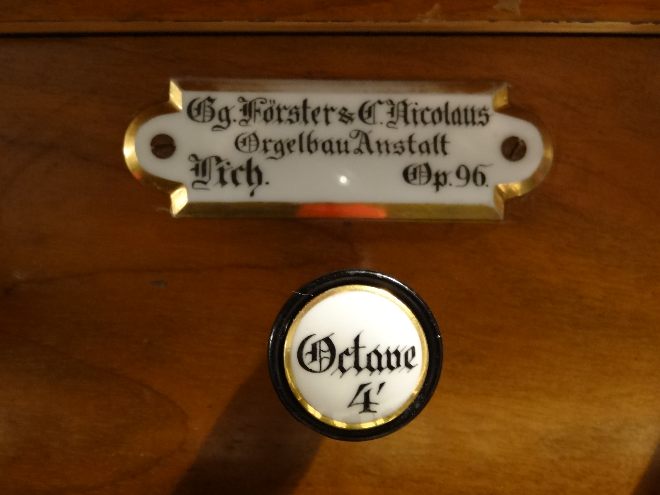 Evangelische Kirche (Hattenrod)Evangelische Kirche (Hattenrod)